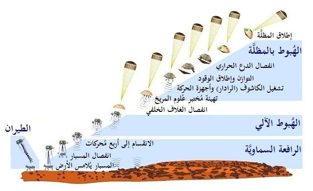 رسمٌ بيانيٌّ لِعمليَّة هُبوط مُختبر عُلوم المرِّيخ بِواسطة المظلَّة، وعبر الهُبوط الآليّ، وعبر الرافعة السماويَّة.